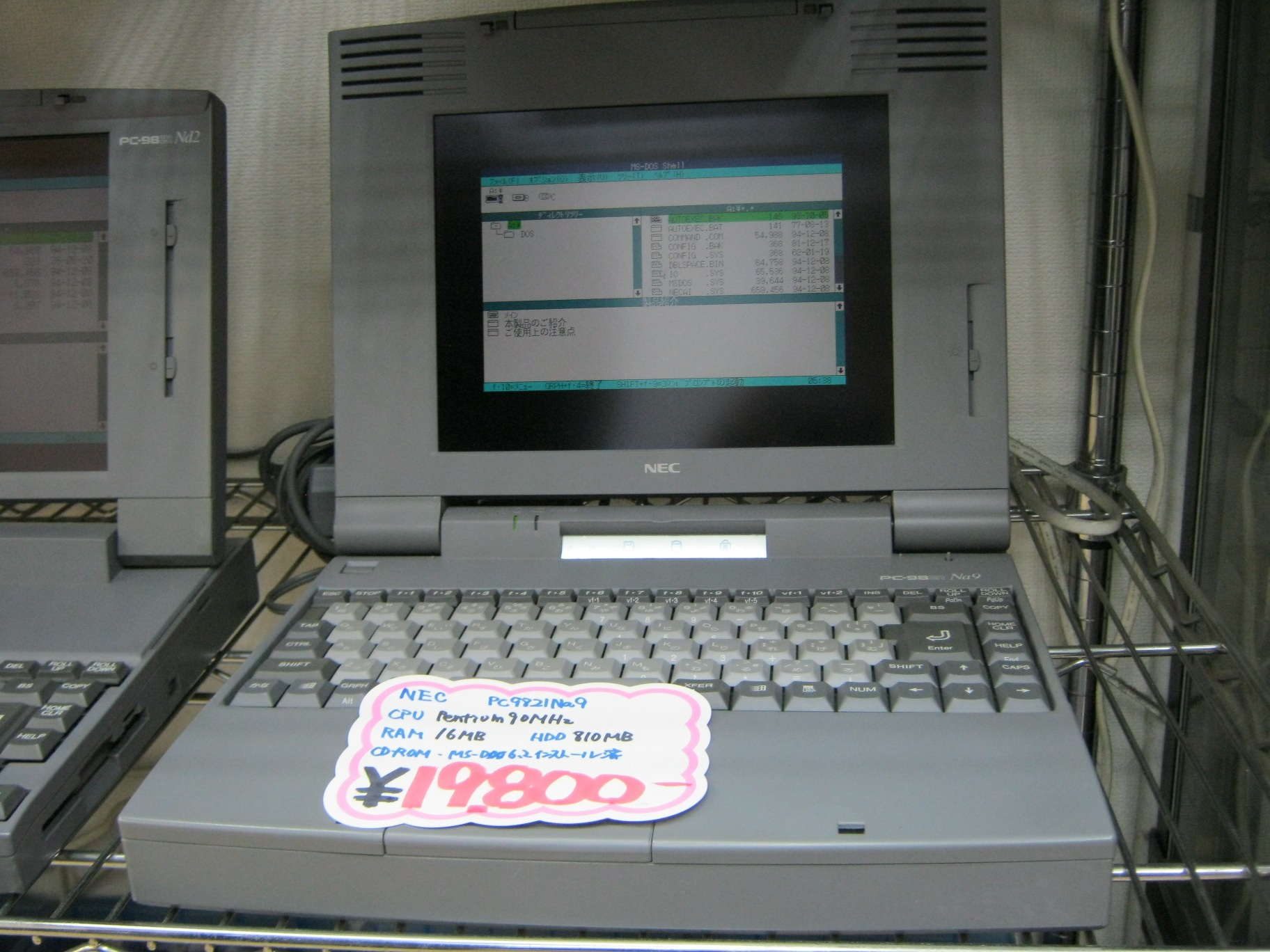 Dans le quartier d'Akihabara, réputé pour être geek et riche en trouvailles informatiques, on ne trouve pas que du dernier cri, comme en témoigne ce vestige dont le prix rebuterait tout autre que le collectionneur. Les initiés pourront apprécier la configuration dernier cri et le système d'exploitation MS-DOS Shell de ce dinosaure de l'ordinateur portable.